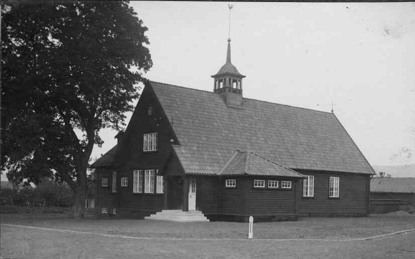 Församlingshemmet mot sydväst. Kategori: (01) ExteriörerFörsamlingshemmet mot sydväst.